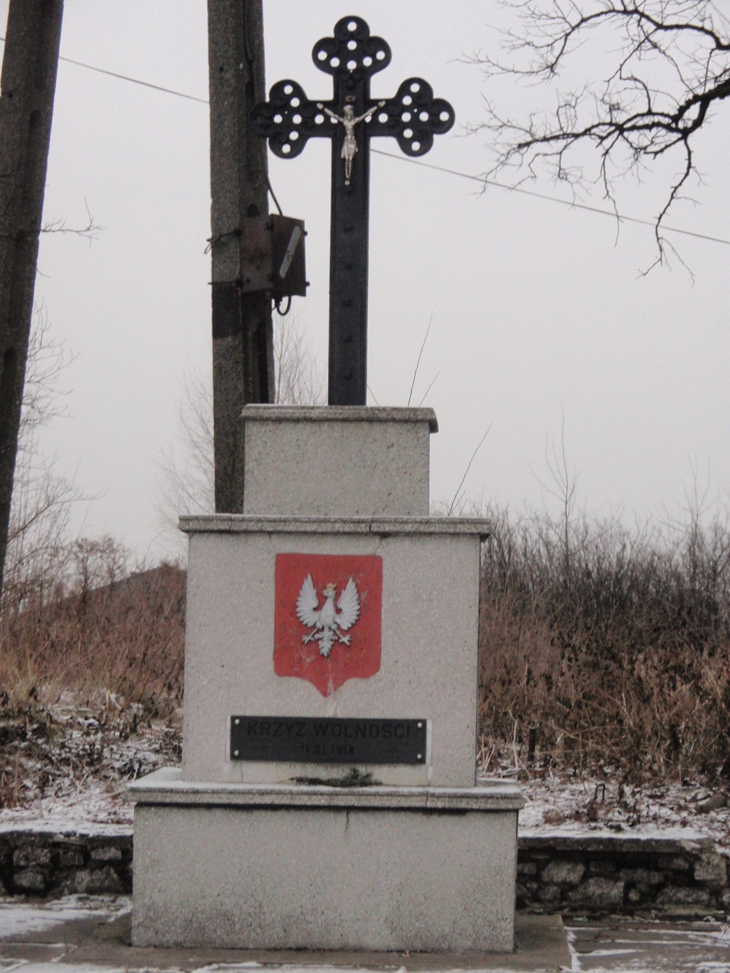 Krzyż wolności (Sławków, woj. śląskie)